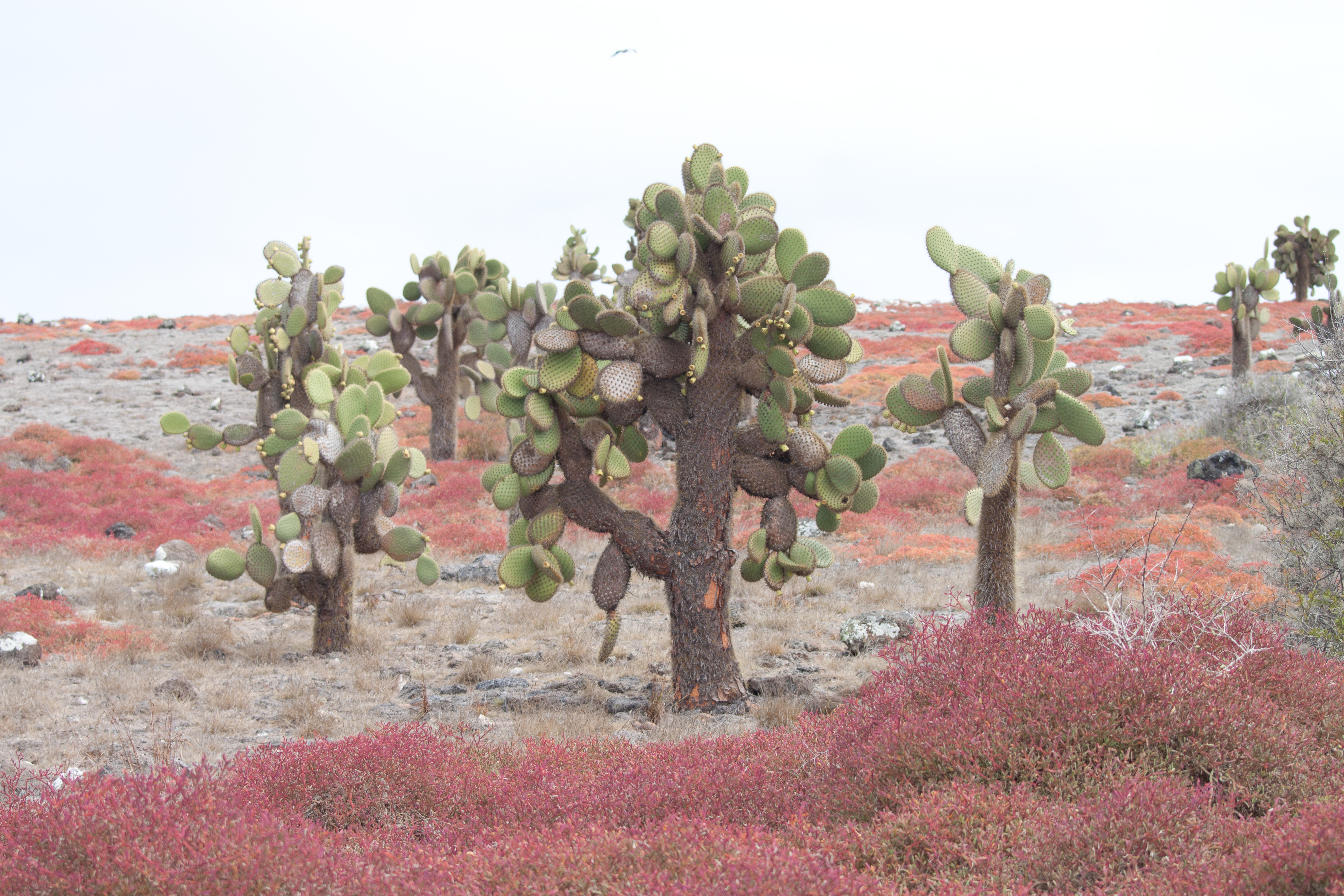 IMG_5255-31.jpg